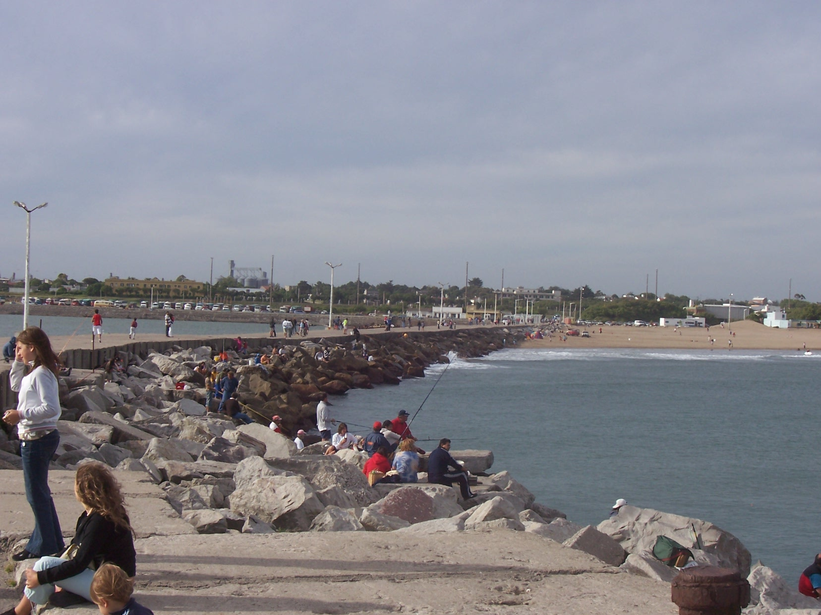 La escollera norte, en la desembocadura del río Quequén Grande, en Argentina.